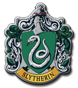 Basado en los libros de Harry Potter